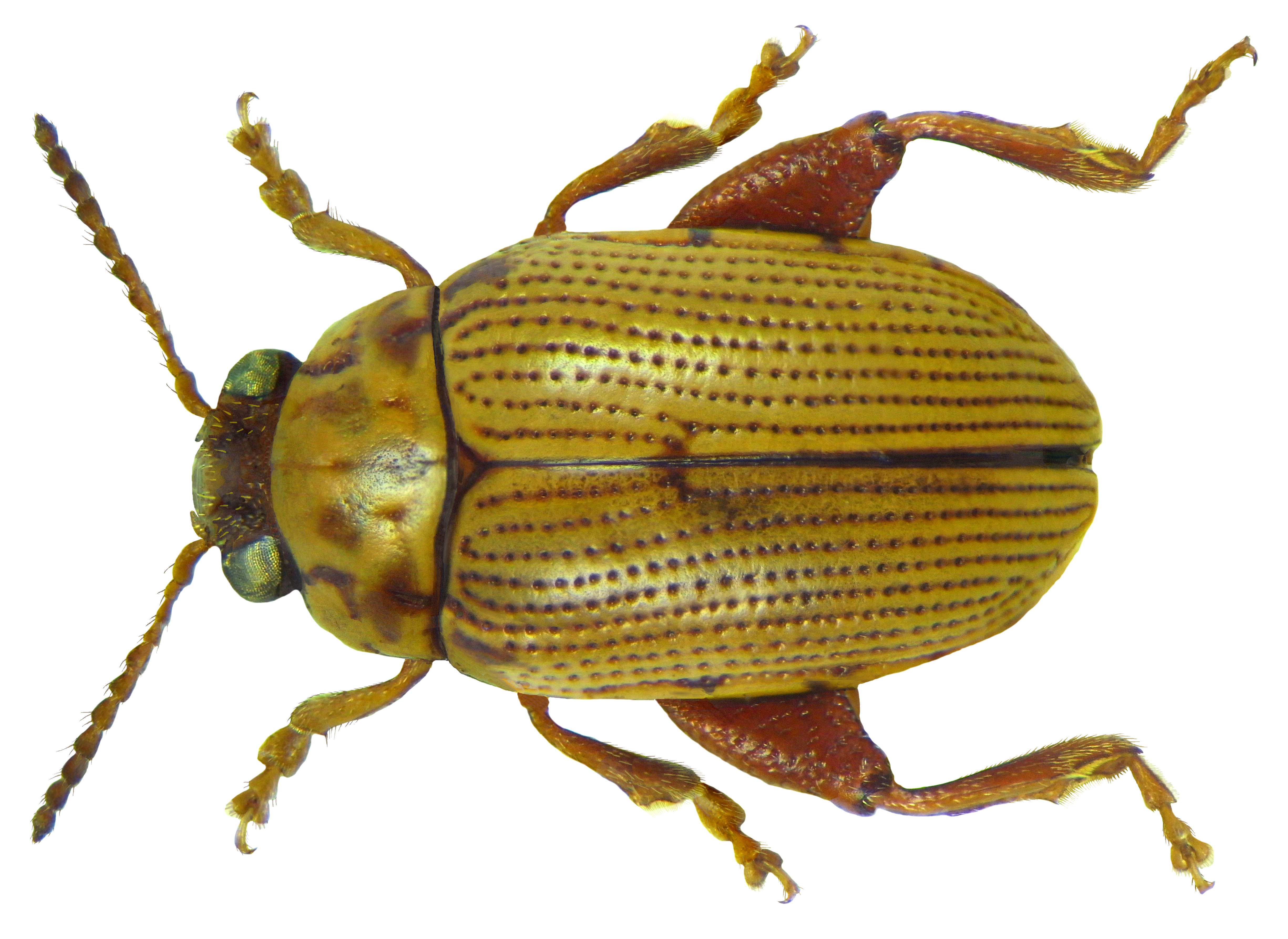 Family: Chrysomelidae Size: 5.5 mm Location: Namibia, Windhoek, Daan Viljoen Park leg. U.Schmidt , 13.II.1995; det. Mauser, 2011 Photo: U.Schmidt, 2012